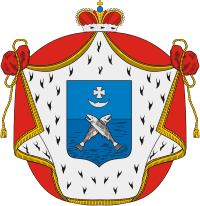 Герб из Общего гербовника дворянских родов Российской империи